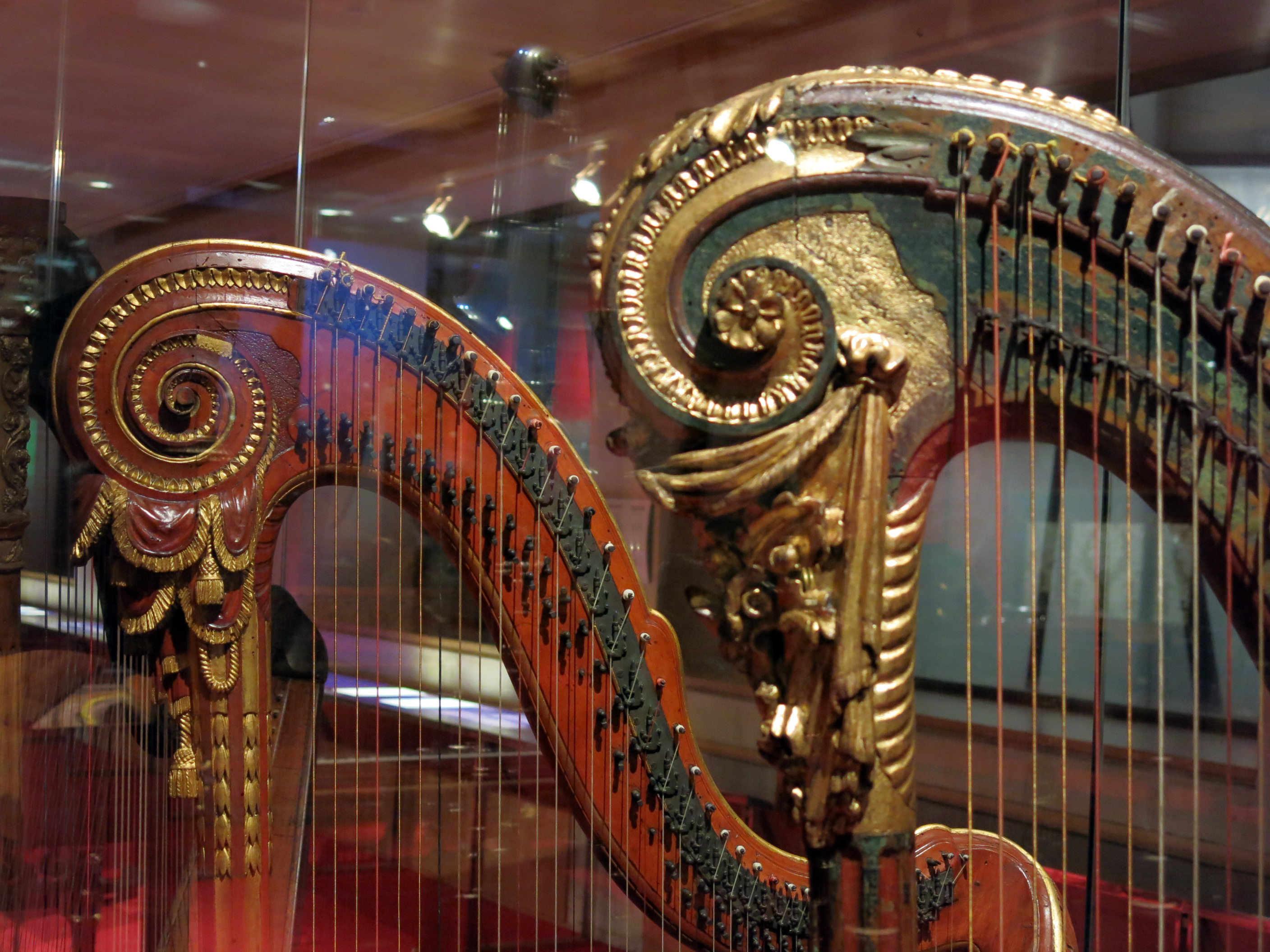 Arpa. Cousineau Père et Fils Cousineau, Georges Cousineau, Jacques-Georges. París. ca. 1800. (MDMB 10)./ Arpa. Lambert. París. 1745 - 1798. (MDMB 519). Detail of Harps of the Museu de la Música de Barcelona.